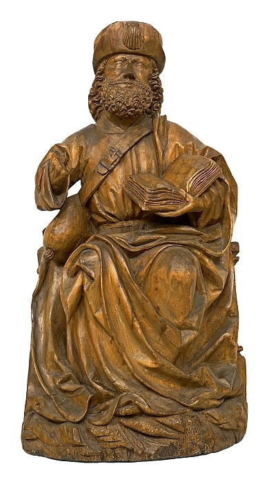 Sv. Jakub Větší (kostel sv. Mikuláše v Chebu), 1508